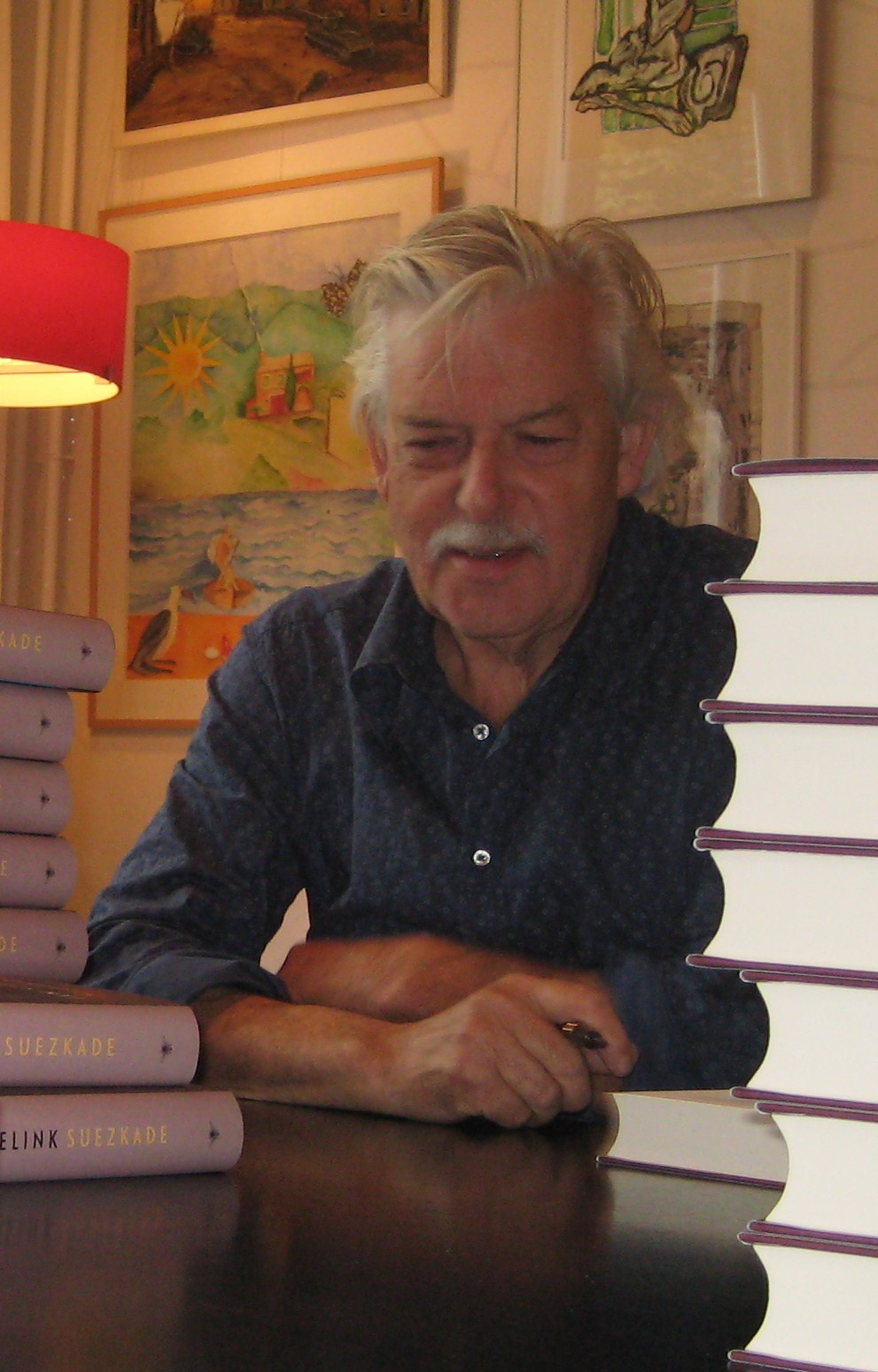 Jan Siebelink